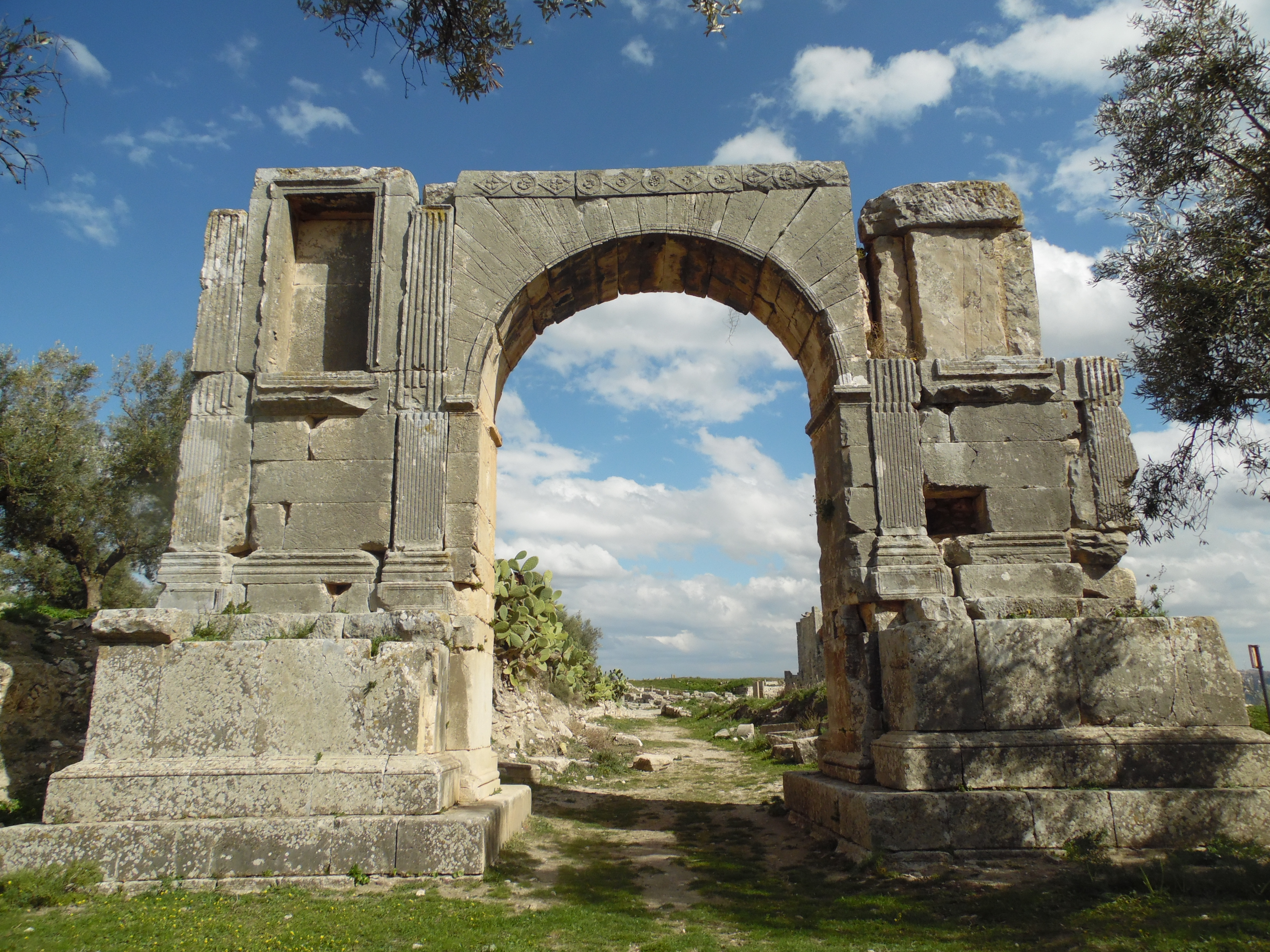 Arc de triomphe